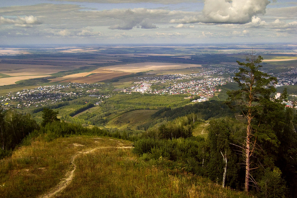 Белокуриха, Алтайский край. Вид на город с горы Церковка